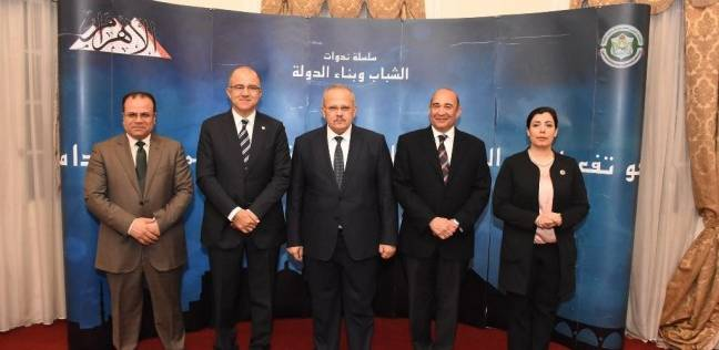 جامعة القاهرة مؤتمر "بناء الدولة والشباب .. نحو تفعيل دور الشباب في اطار استراتيجية التنمية المستدامة .. رؤية مصر 2030" برفقة كل من بالترتيب من الجانب الايمن د.جهاد عامر نائب رئيس الإتحاد العربي لإعداد القيادات الشبابية وعضو مجلس النواب، علاء ثابت رئيس تحرير الأهرام، د.محمد عثمان الخشت رئيس جامعة القاهرة، المهندس محمد السويدي رئيس اتحاد الصناعات المصرية وعضو مجلس النواب، د. صبحي عسيلة خبير في مركز الدراسات السياسية والإستراتيجية بالأهرام